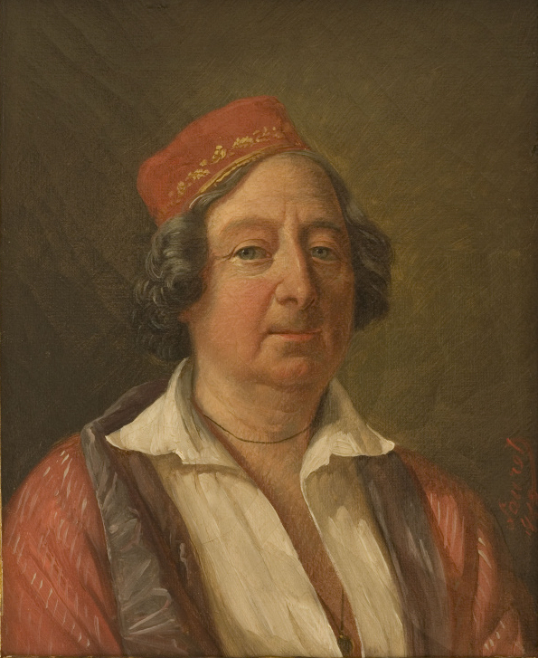 Portrait d'Hippolyte Marie Guillaume de Rosnyvinen (1778-1850) général et comte d'Empire